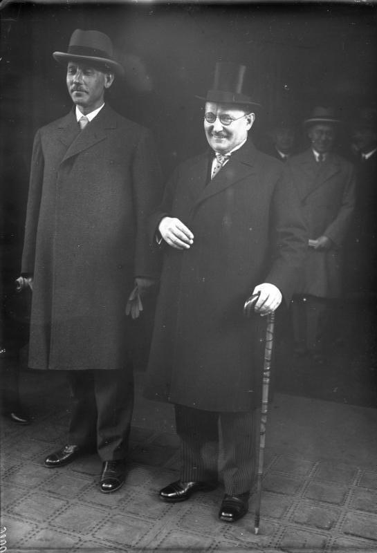 Der Präsident des estländischen Parlaments zu Besuch in Berlin! Unser Bild zeigt den Präsidenten des estländischen Parlaments Einbund (links) und den Präsidenten des deutschen Reichstages Loebe bei der Ankunft auf dem Bahnhof Friedrichsstrasse in Berlin